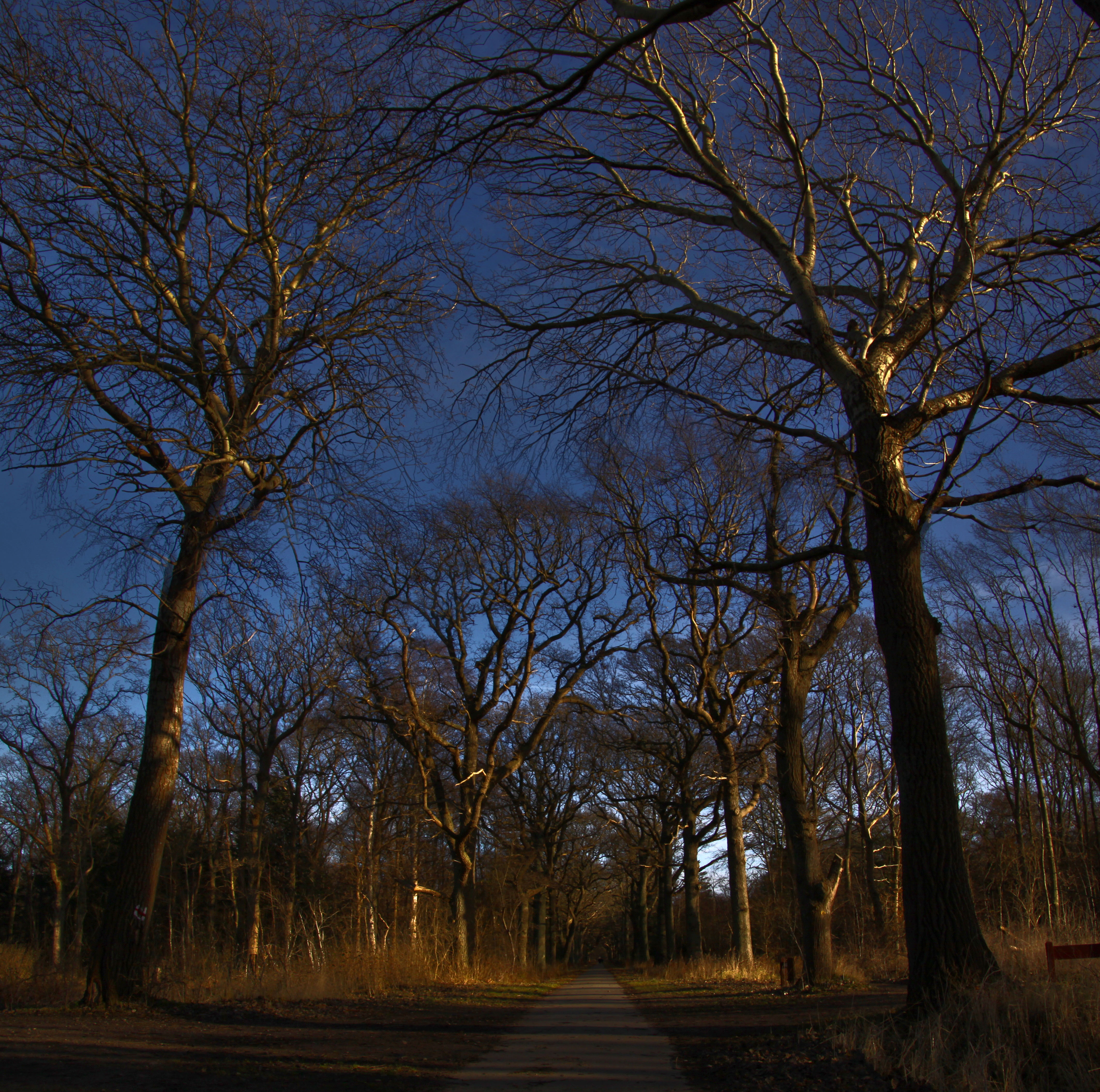 Kongelunden. I skoven.